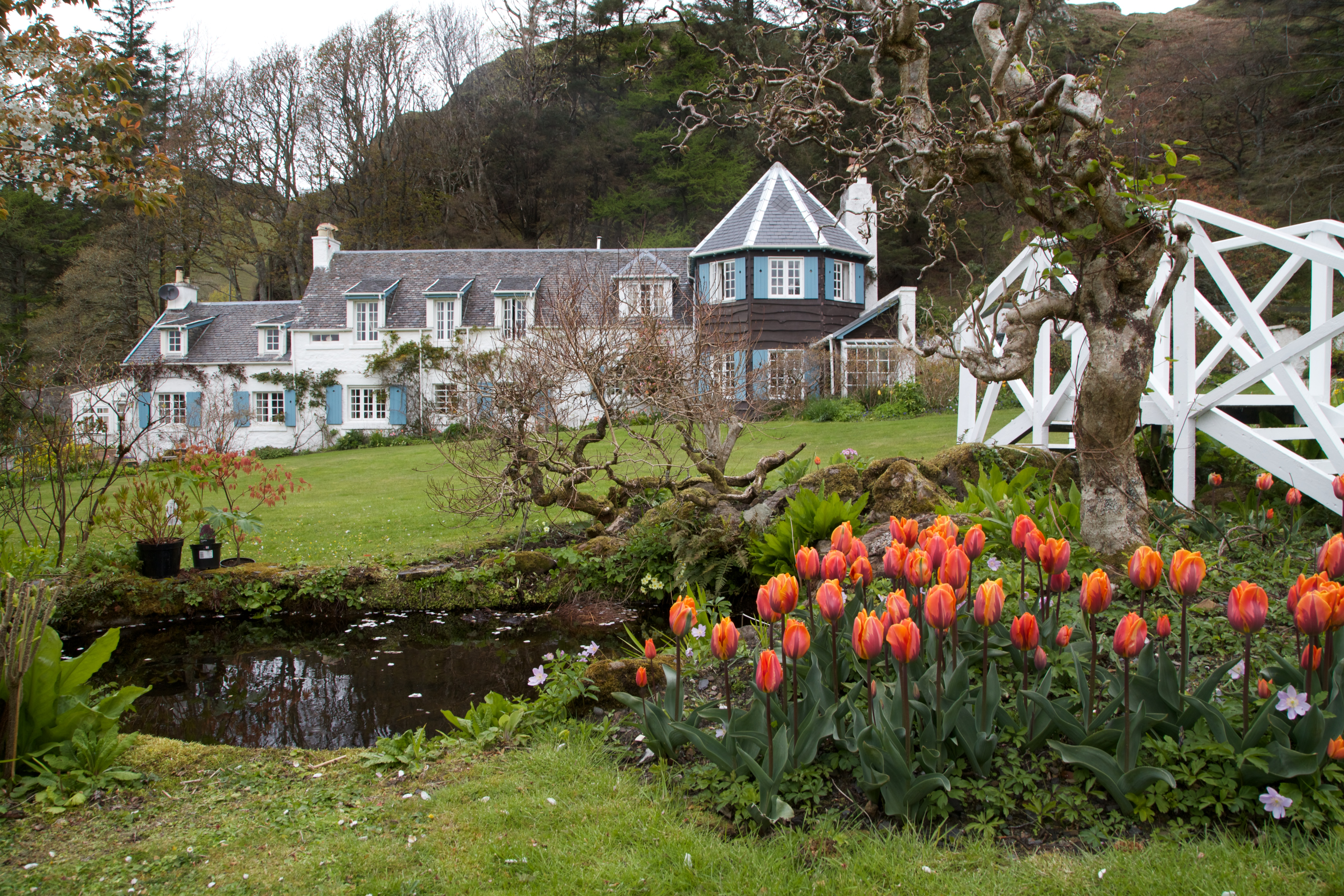 An Cala, Seil